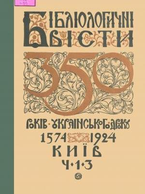 Библиологические вести (Template:Lang-uk) — ежеквартальный научно-книговедческий журнал.